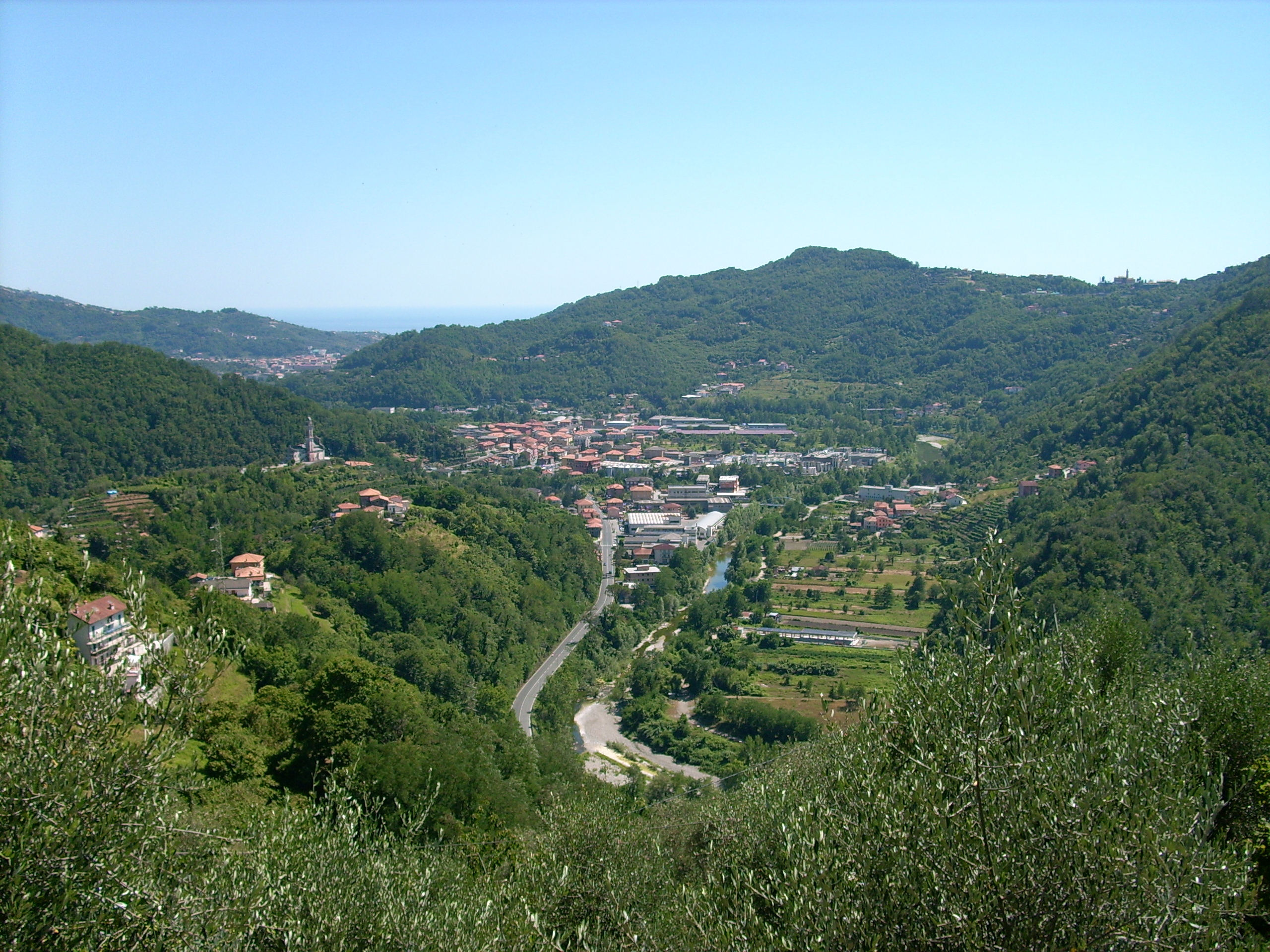 Panorama dell'entroterra di Chiavari, Liguria, Italia